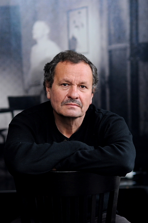 Miroslav Krobot (nar. 1951), umělecký šéf Dejvického divadla, režisér a herec.